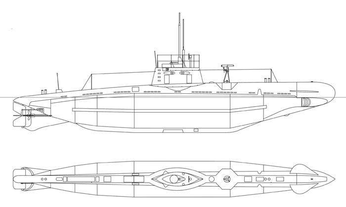 Riß des UB-I U-Boot Types von 1914